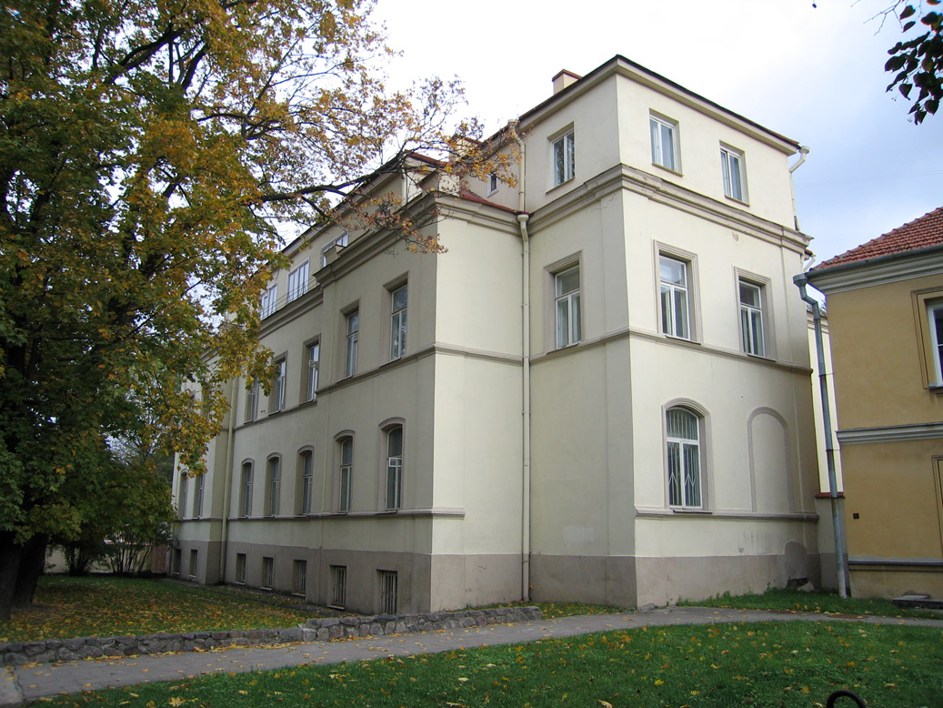 Vilnius Art Academy